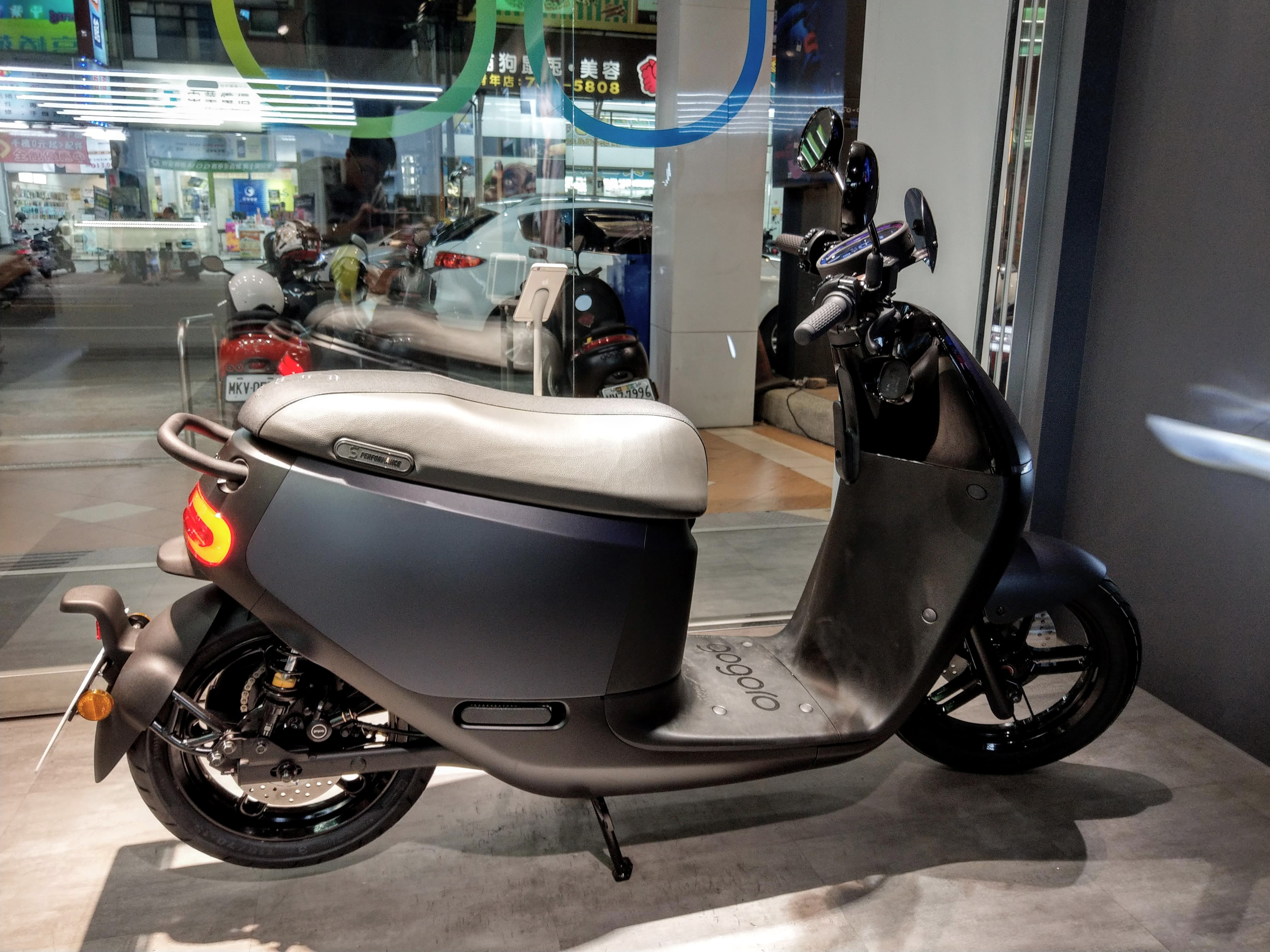 Gogoro S2 的全車側身模樣。